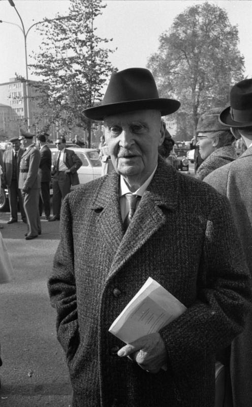 Afrika-Woche 1962 in der Beethovenhalle Herzog Adolf Fried. zu Mecklenburg